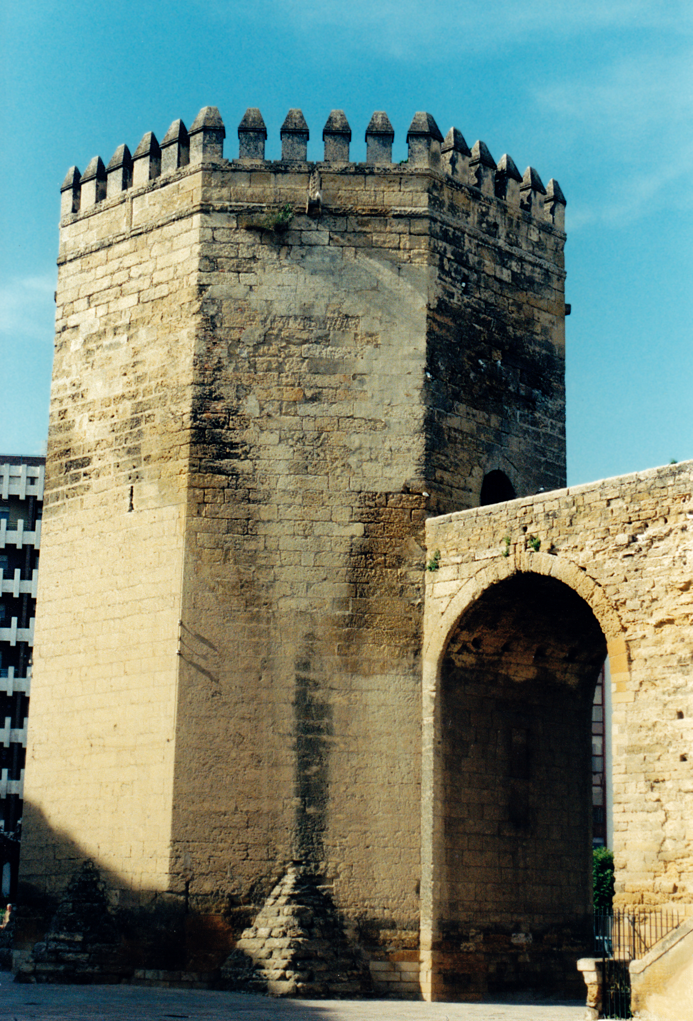 Cordoue - Tour de la Malmuerta (almohade)